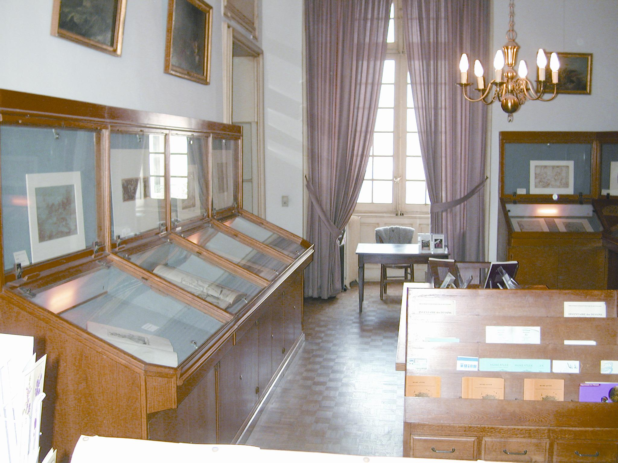 Le musée Atger de Montpellier (Hérault) (meilleure qualité) Photographie personnelle